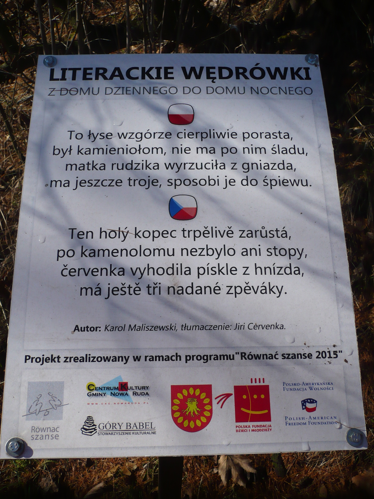 Literackie Wędrowki